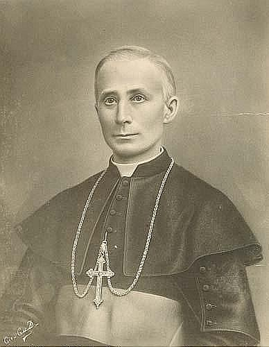 Portrait de Mgr Alexis-Xyste Bernard.